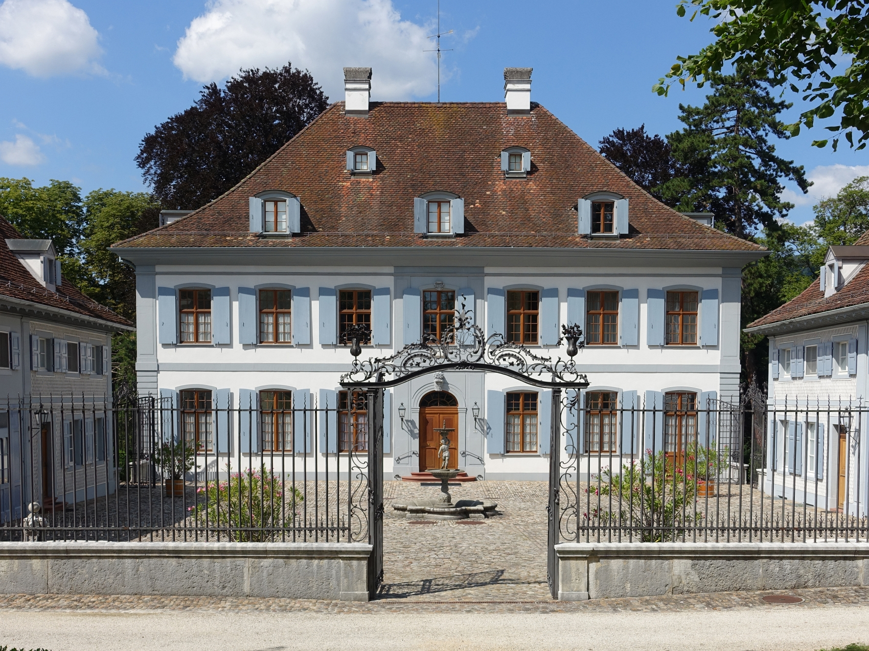 Schloss Ebenrain, Sissach, Schweiz